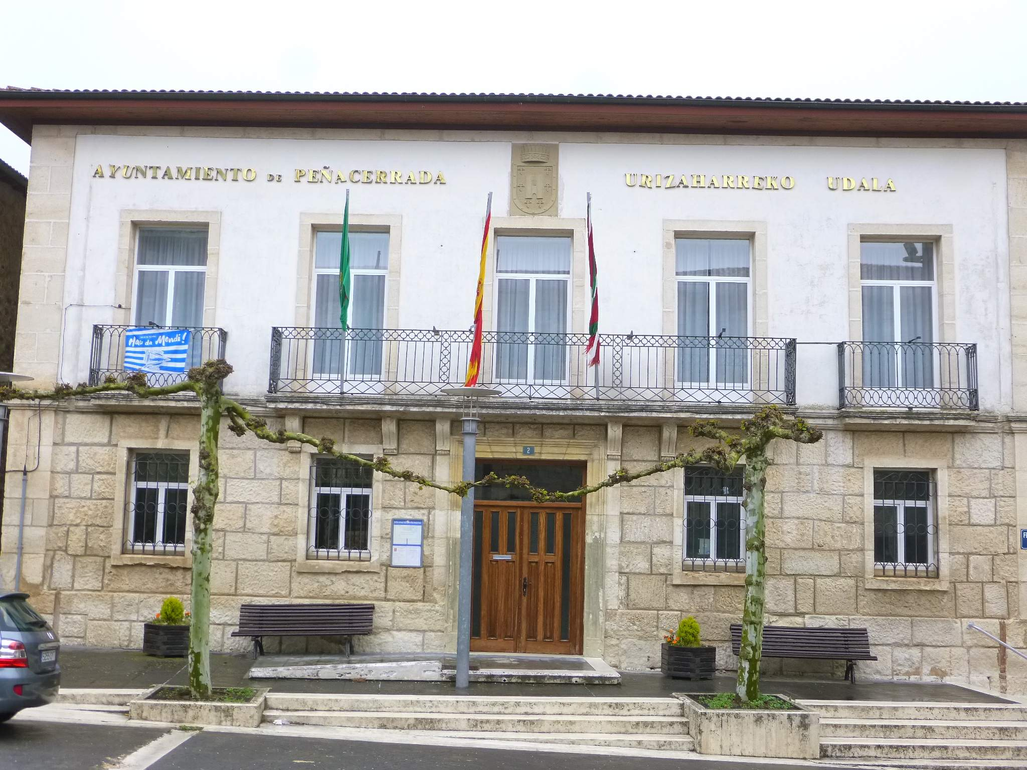 Ayuntamiento de Peñacerrada (Álava)